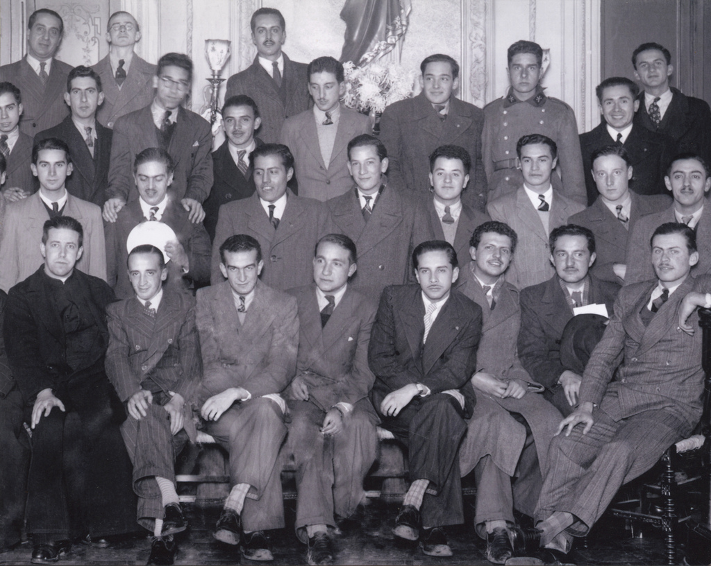 Aparecen en la fotografía: Padre Alberto Hurtado, padre vergara, padre Oscar Larraín Marín, Lisandro Urrutia, Raúl Oliva, Rodolfo Valdés Phillips, Santiago Vivanco, Pedro Armendáriz, Hugo Hanish y William Thayer.